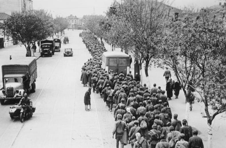 Scherl: An der Sowjetfront: Frühjahrsschlacht um Charkow.- Stündlich wächst die Zahl der Gefangenen. Gefangene Sowjets auf dem Marsch durch Charkow. Immer grösser werden die Kolonnen von Gefangenen, die Tag für Tag durch die sowjetische Grosstadt Charkow ziehen. PK-Aufnahme: Kriegsberichter: Schneider 3230-42 Mai 42 Советские пленные в Харькове из "Барвенковского котла". Конец мая 1942